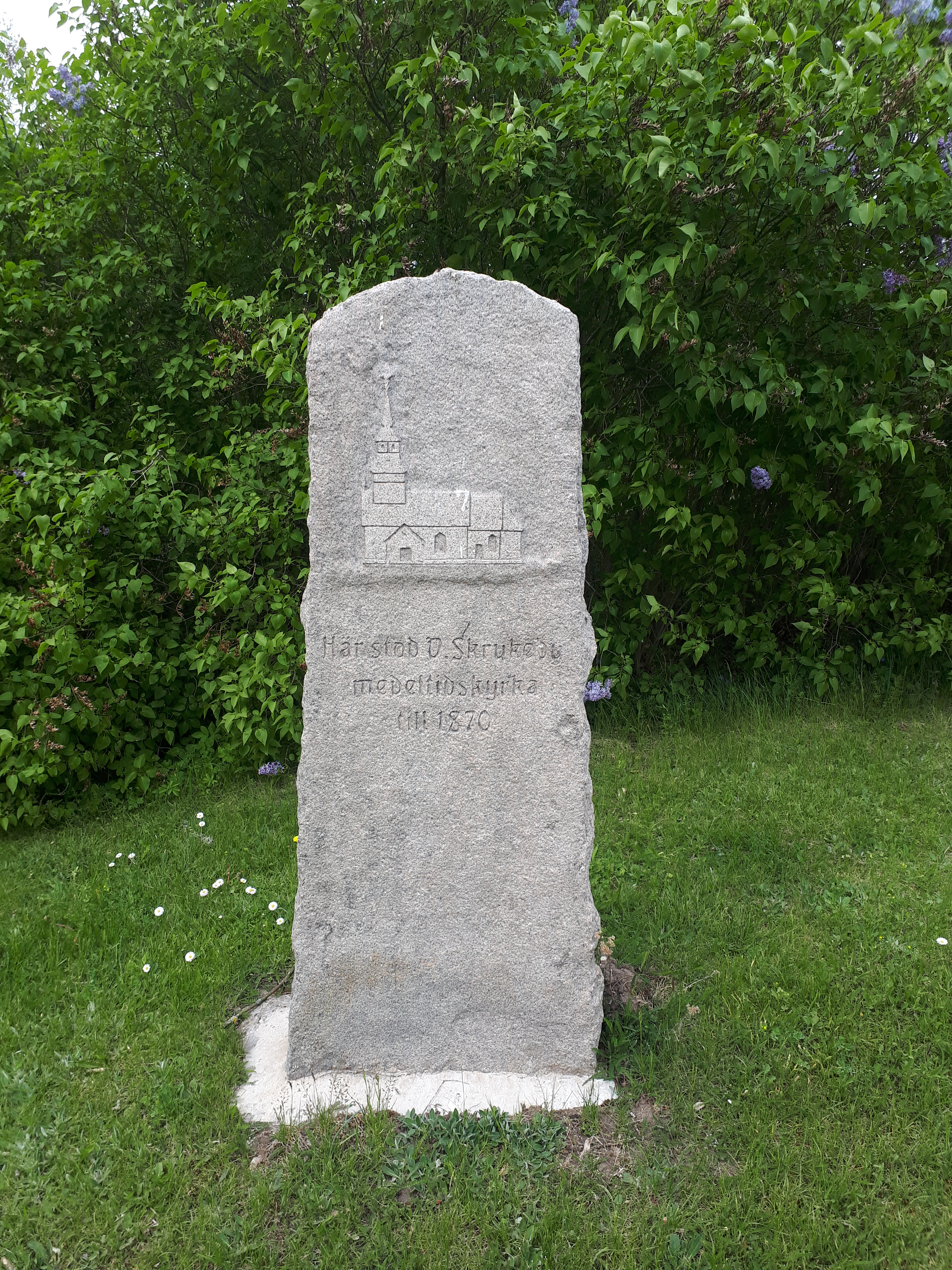 Inskription: Här stod V. Skrukeby medeltidskyrka till 1870.